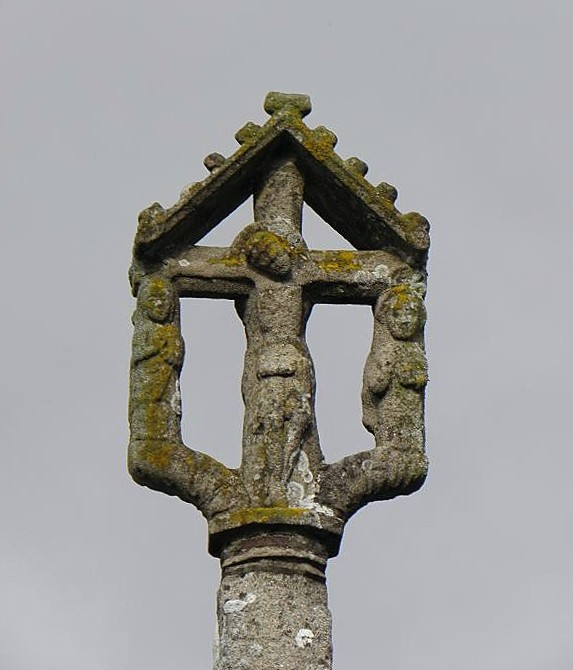 Crucifixion. Détail du calvaire du cimetière de Gahard (35).